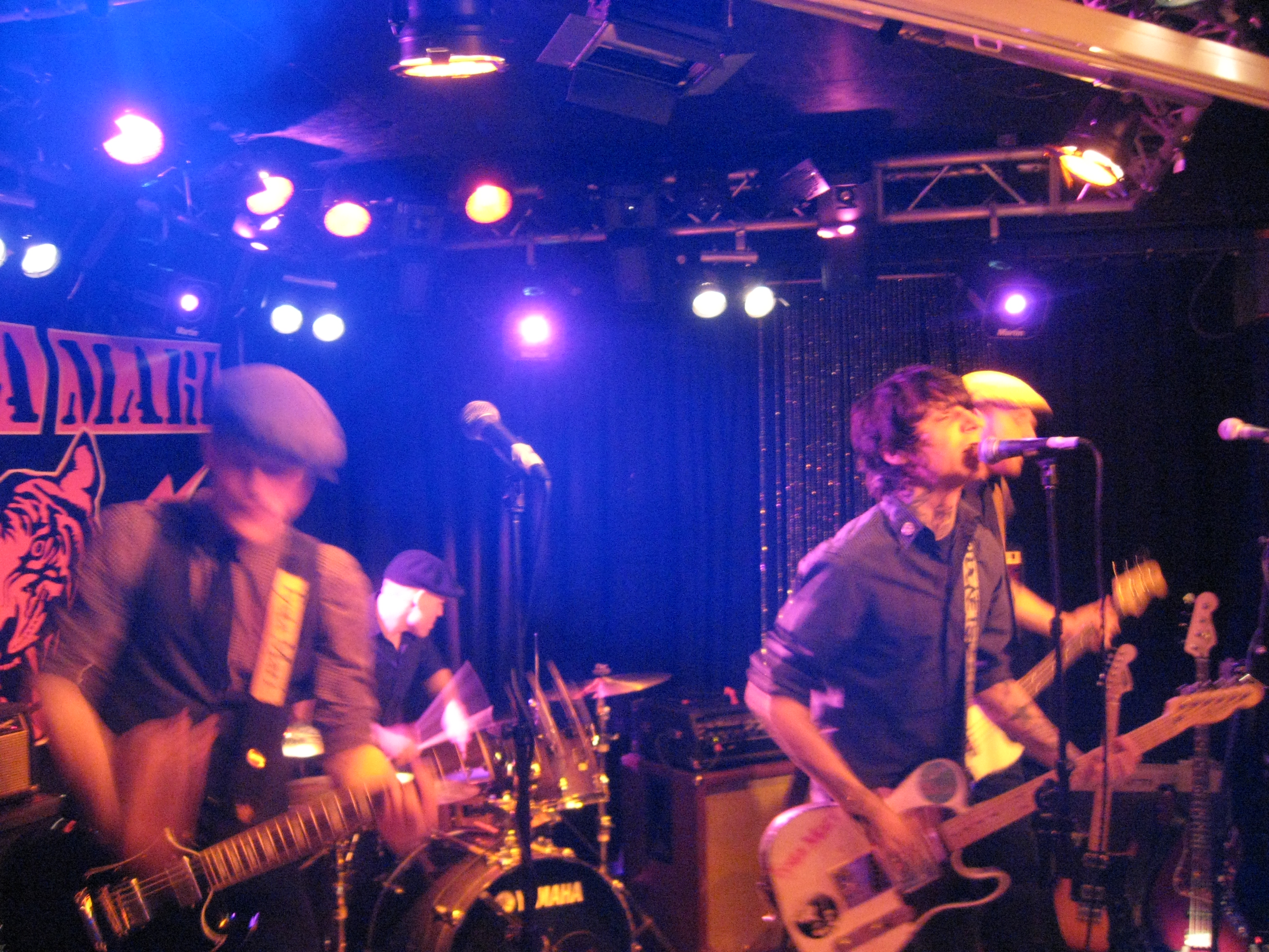 Tysta Mari har releaseparty för nya skivan på Alcazar (Nalen) 25/4 2009.